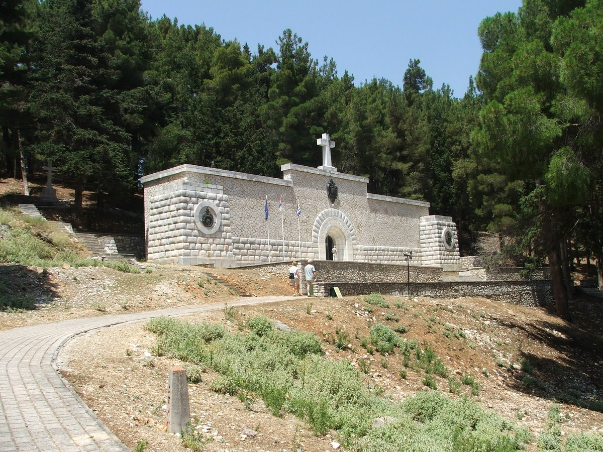 Serbian WWI soldiers mausoleum on Vido island